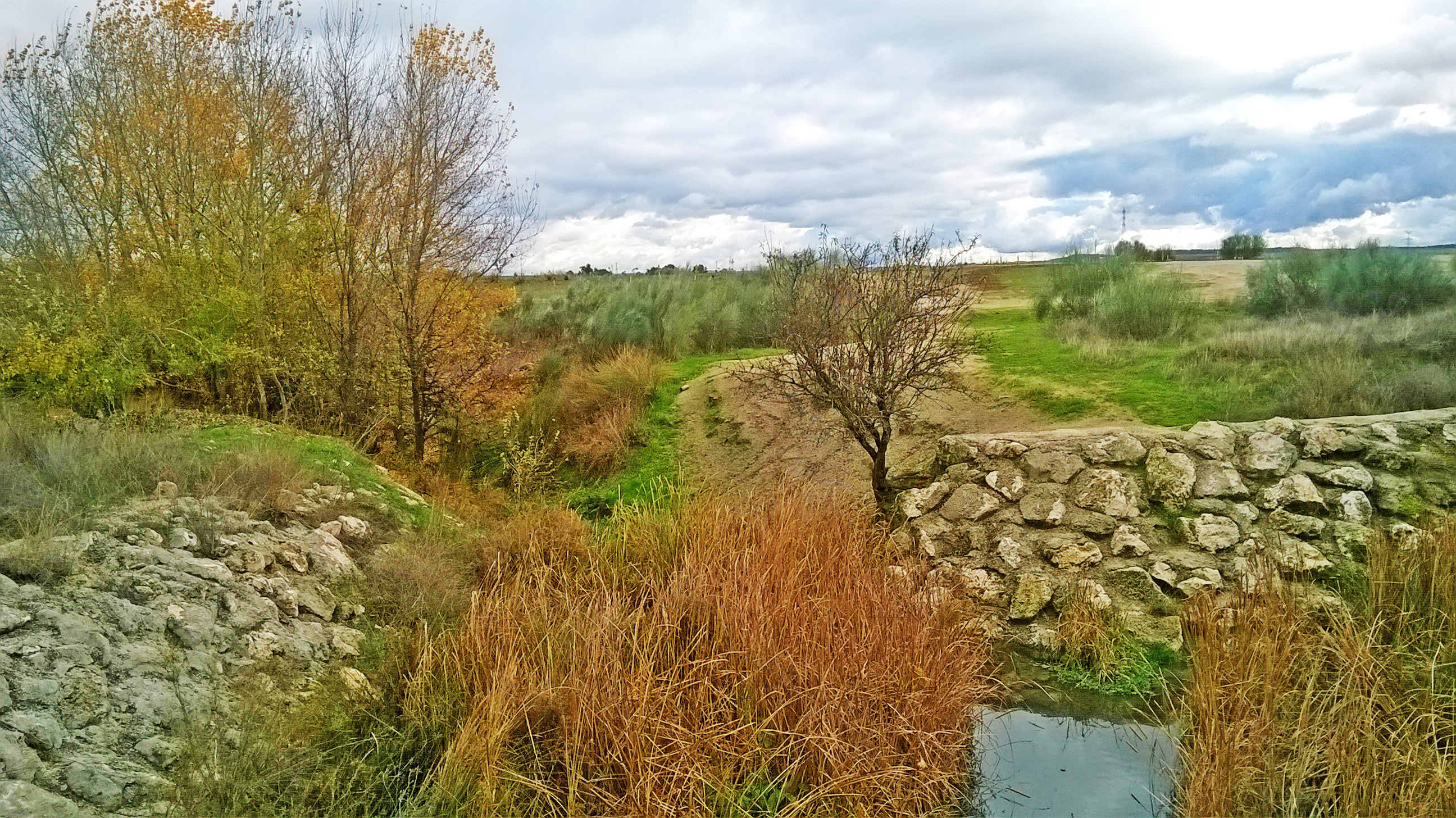 Arroyo Humanejos embalse hospital